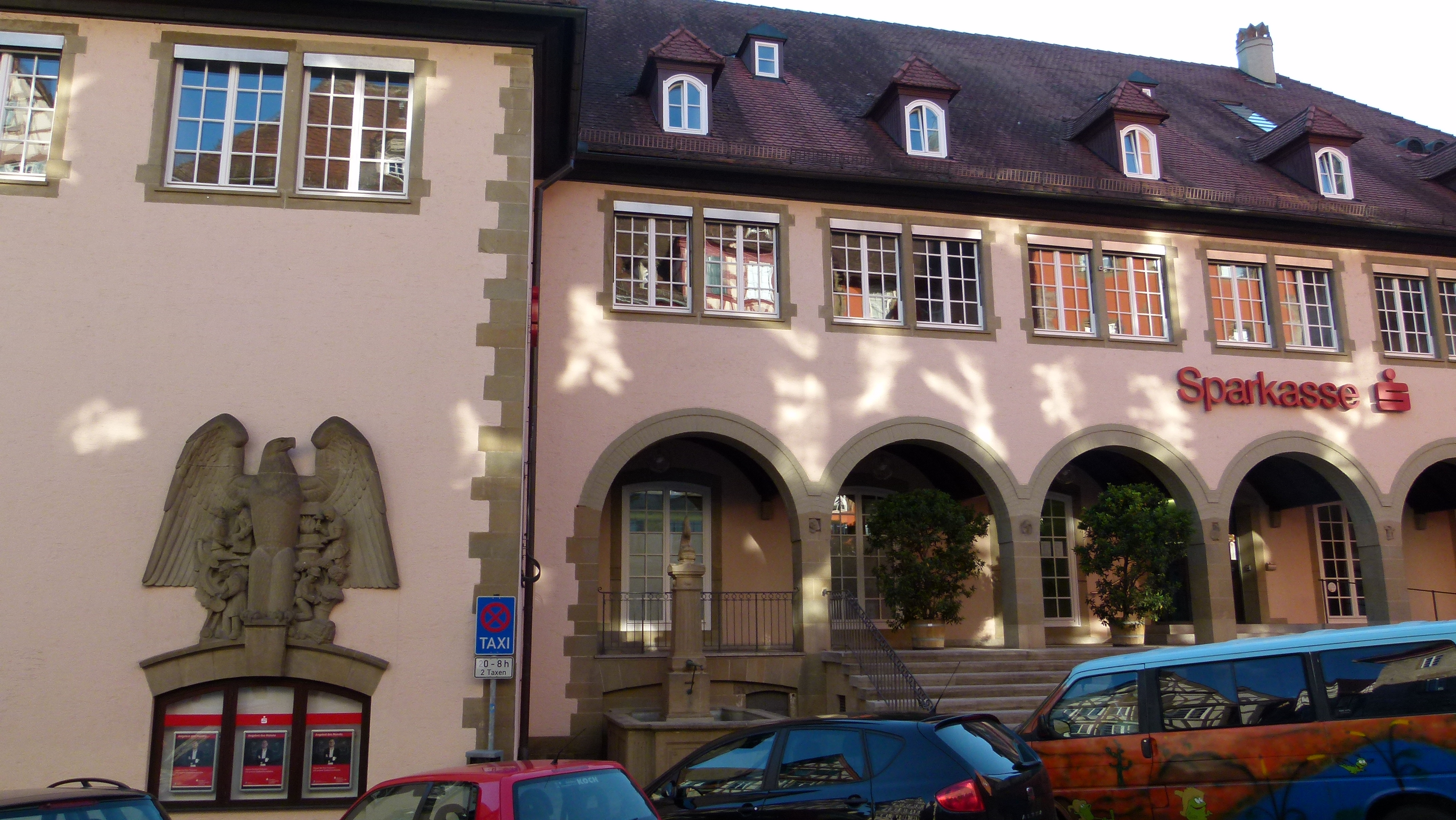 Denkmalgeschütztes Sparkassengebäude, Hafenmarkt 1, Schwäbisch Hall